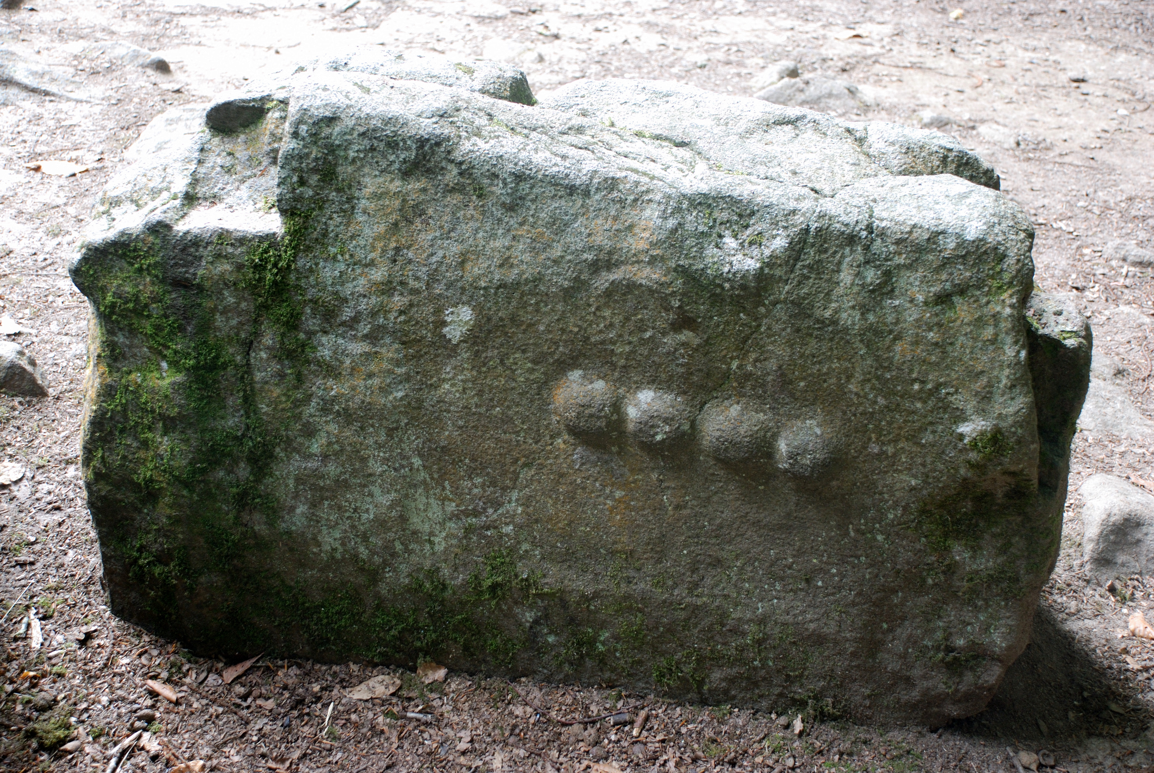 Pierre du monument funéraire datant de 2500 a.C., on dit qu'elle abritait le culte de la déesse mère. Pour preuve, pierre avec quatre seins. À l'origine, la cella en abritait seize paires. Mais, en 1960, la majorité a été martelée. Recouverte par sept grandes dalles de granit, mesure 11 mètres de long, 2,60 m de large et 1,60 m de haut.